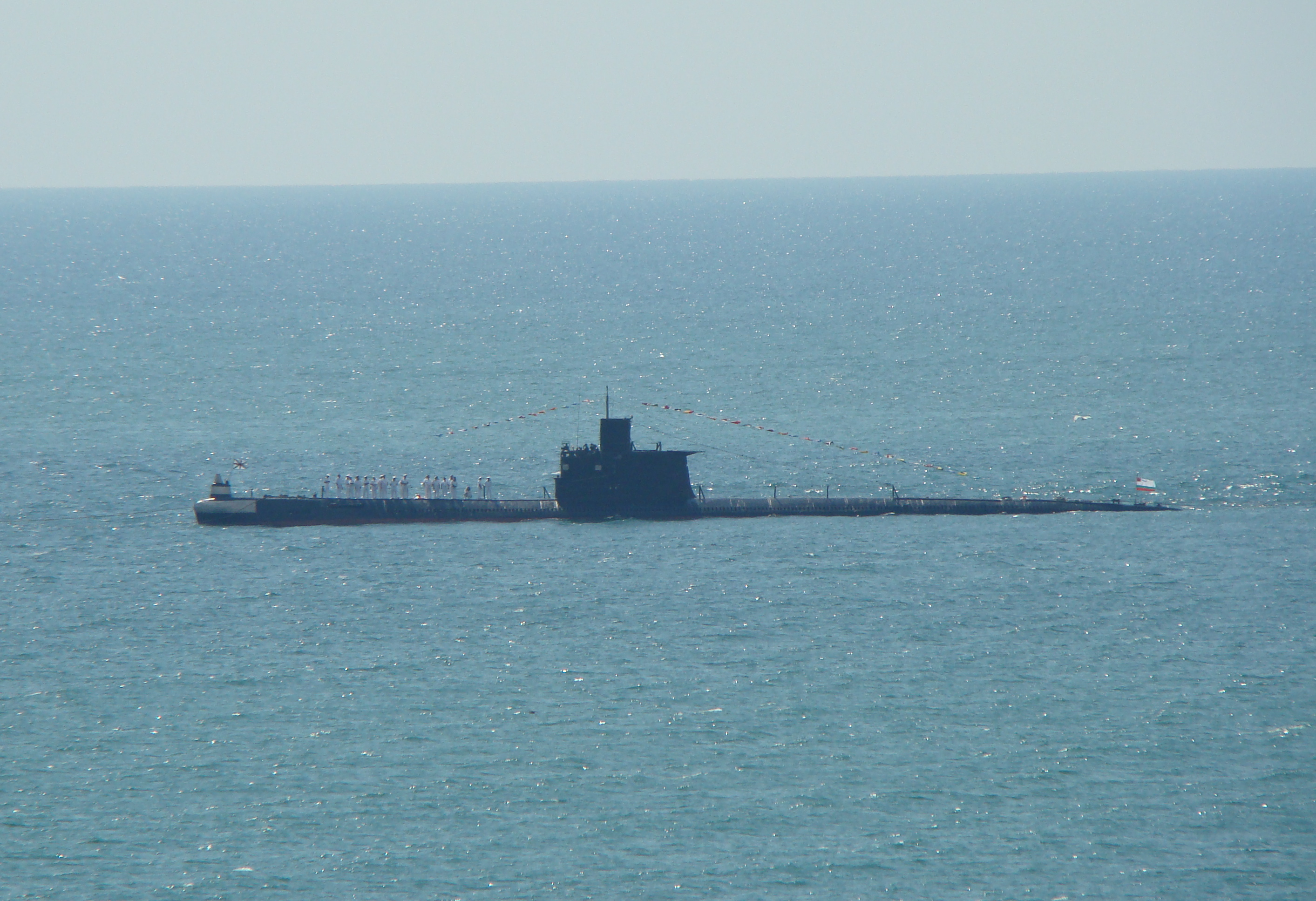 Подводная лодка Слава